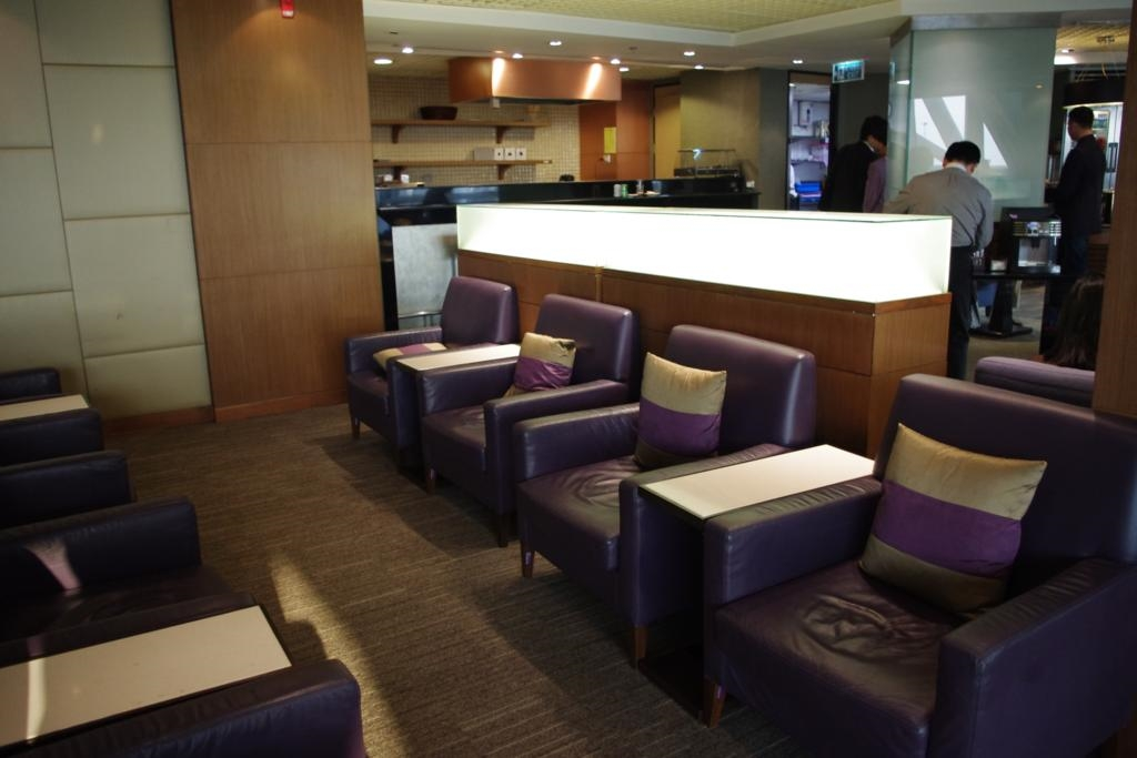 BKK Thai Royal Silk Lounge